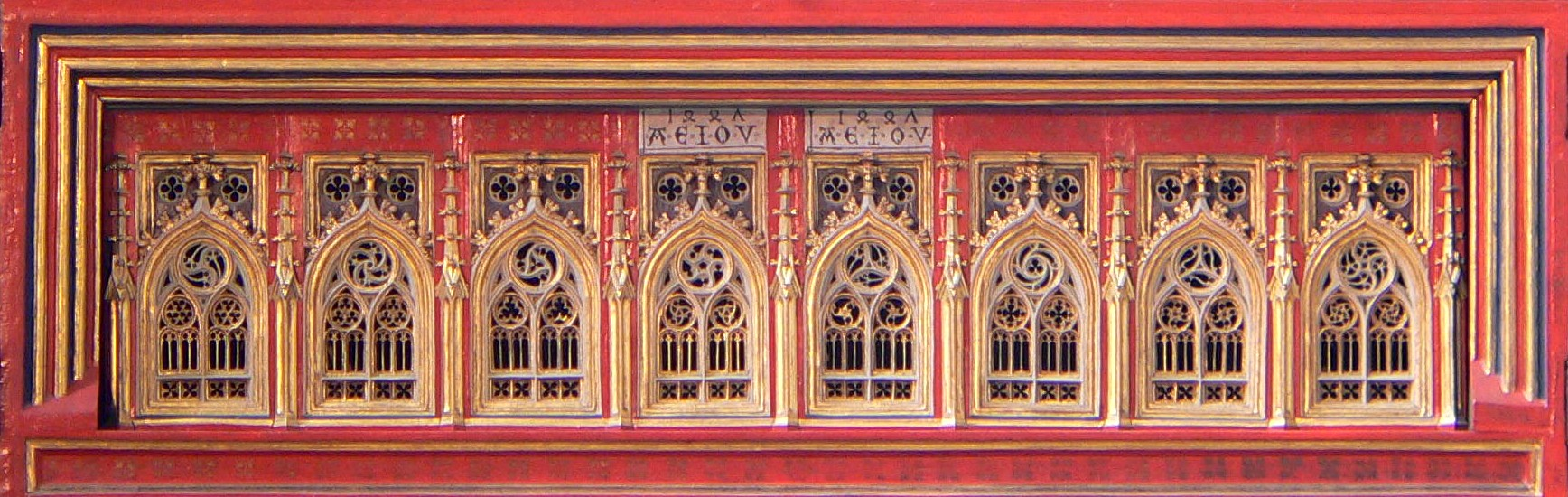 Der Wiener Neustädter Altar im Stephansdom, Wien - Detailaufnahme Predella: Mit Maßwerkfenstern, der Jahreszahl 1447 und dem Schriftzug A.E.I.O.U.